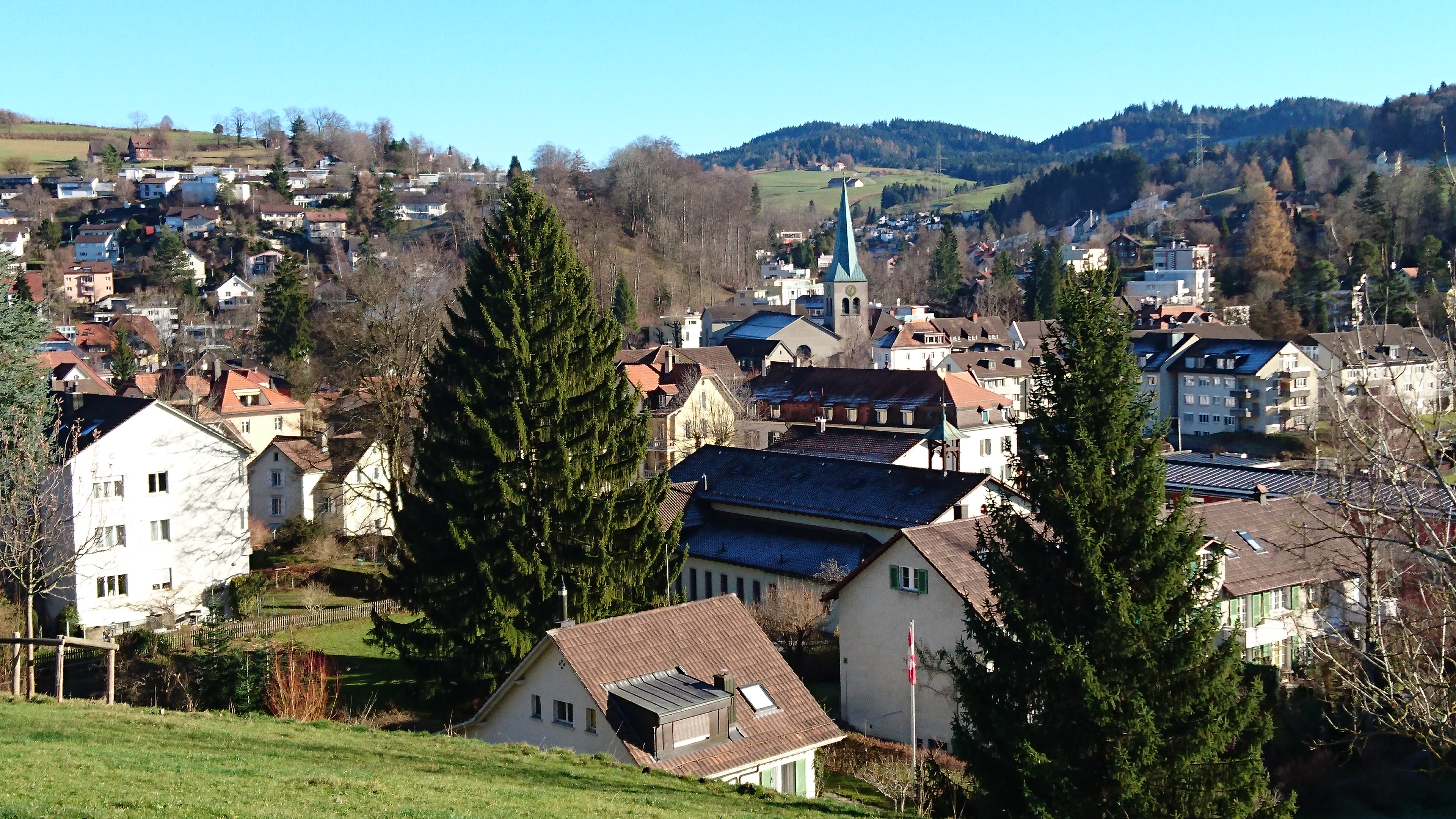 Blick auf St. Georgen vom Hang der Berneck gegen Osten. Rechts der Mitte die Kirche von St. Georgen. Dahinter das Steinachtal